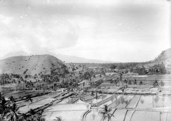 Negatief. Sawahlandschap bij Boegboeg, Karangasem